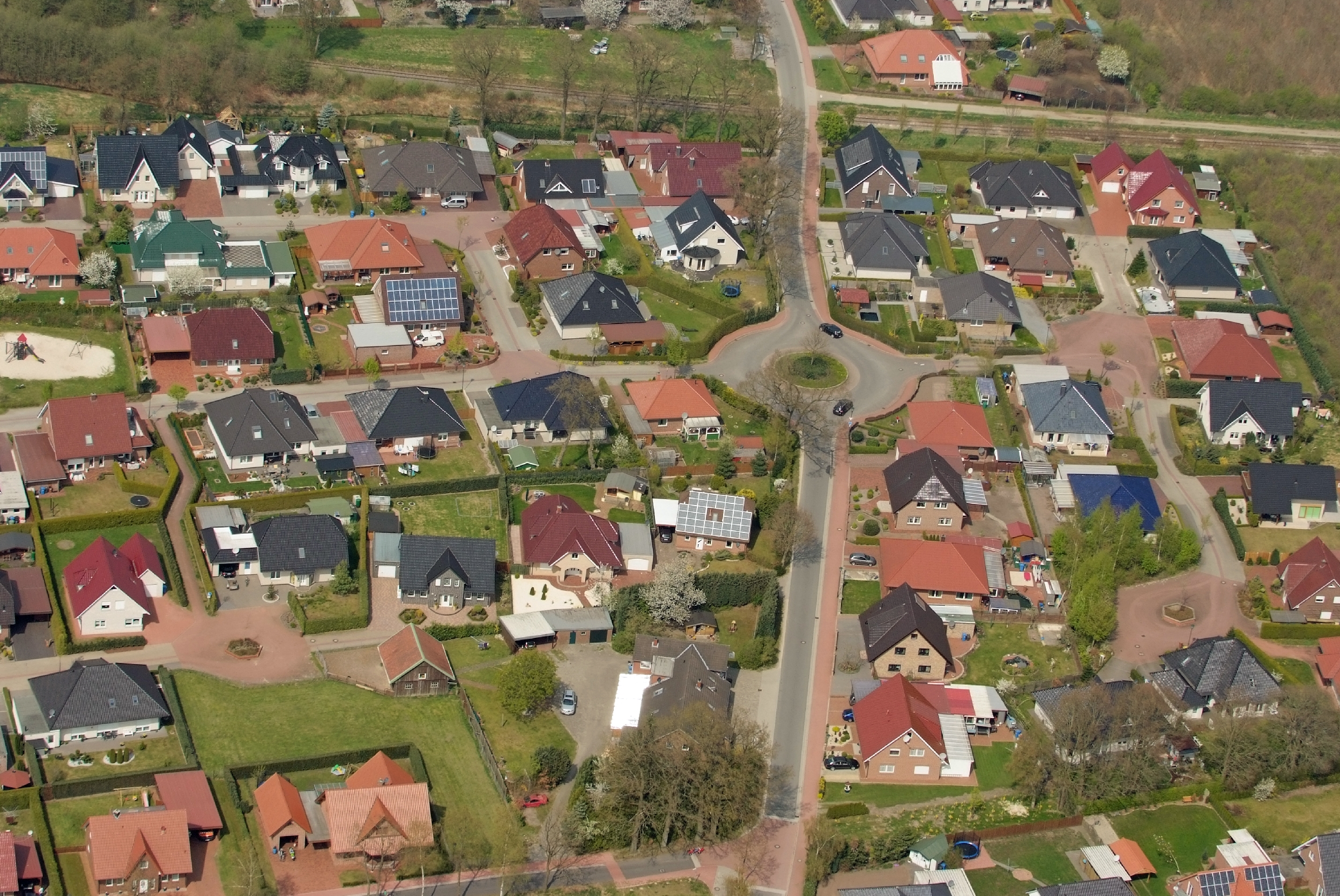 Fotoflug von Nordholz-Spieka nach Oldenburg und Papenburg